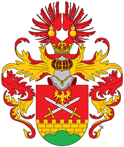 Wappen des österreichisch-ungarischen Obersten i. R. Rudolf Meißner, verliehen anlässlich seiner Erhebung in den österreichischen Adelsstand mit dem Prädikat "von Hohenmeiß" 1916. Zeichnung von Gerd Hruška ( Für weitere Informationen zu dieser Standeserhebung siehe (